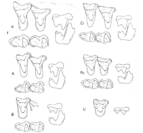 Comparison of molars of Cretaceous placentals. Of each genus are drawn (where known) right M2 and Ml in crown view, left M3 and M2 in crown view, and right M2 in buccal view. Not to scale. Key to lettering in this and succeeding figures: A, Asioryctes nemegetensis; B, Batodon tenuis; Ci, Cimolesters incisus; Cm, Cimolestes magnus; CG, Champ-Garimond molar; G, Gypsonictops hypoconus; Ga, Gallolestes pachymandibularis; K, Kennalestes gobiensis; Pc, Procerberus formicarum; Pm,. Protungulatum donnae; Pu, Purgatorius unio; D, Unnamed eutherian (Fox); Z, Zalambdalestes lechei.